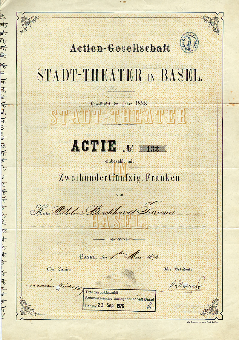 Namensaktie über 250 Franken des Stadt-Theaters in Basel vom 1. Mai 1874